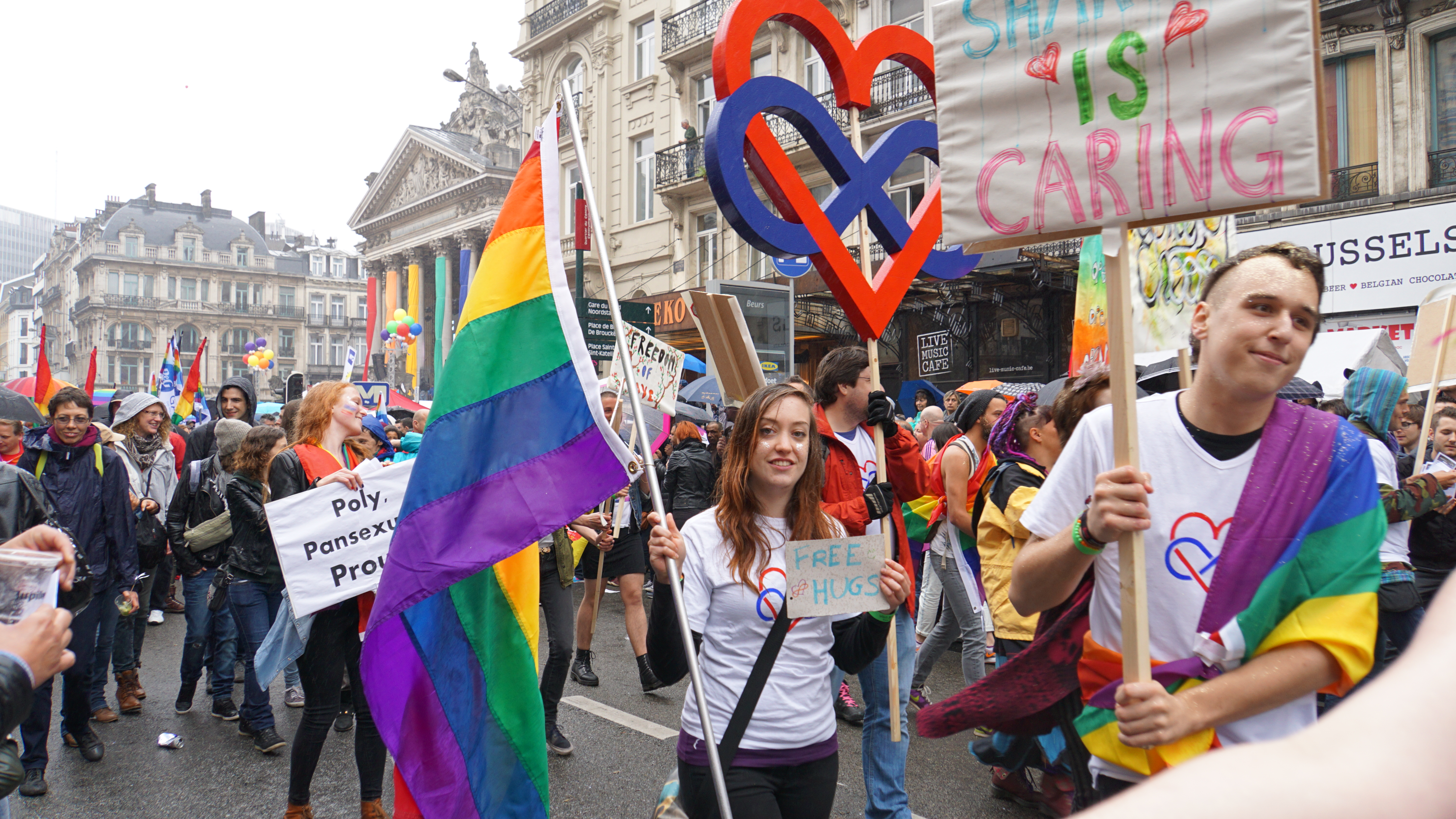 2015-05-16_14-56-35_ILCE-6000_DSC04808 Brussels Pride 2015